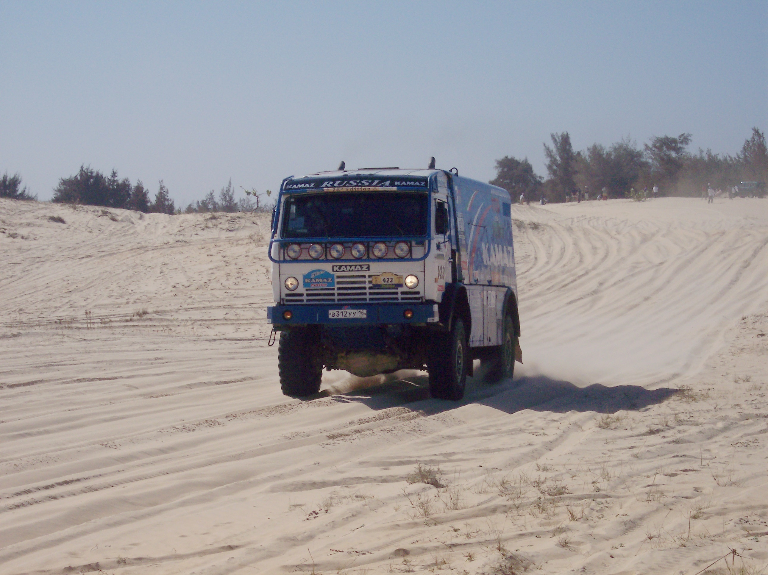 Ilgizar Mardeev's Kamaz truck on final stage Lac Rosé Dakar 2004.